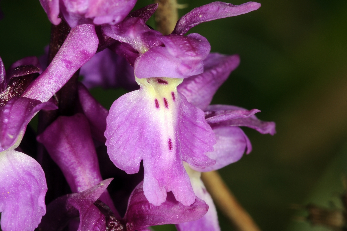 Orchis spec., Steinau bei Schlüchtern, Main-Kinzig-Kreis, Hessen, Deutschland